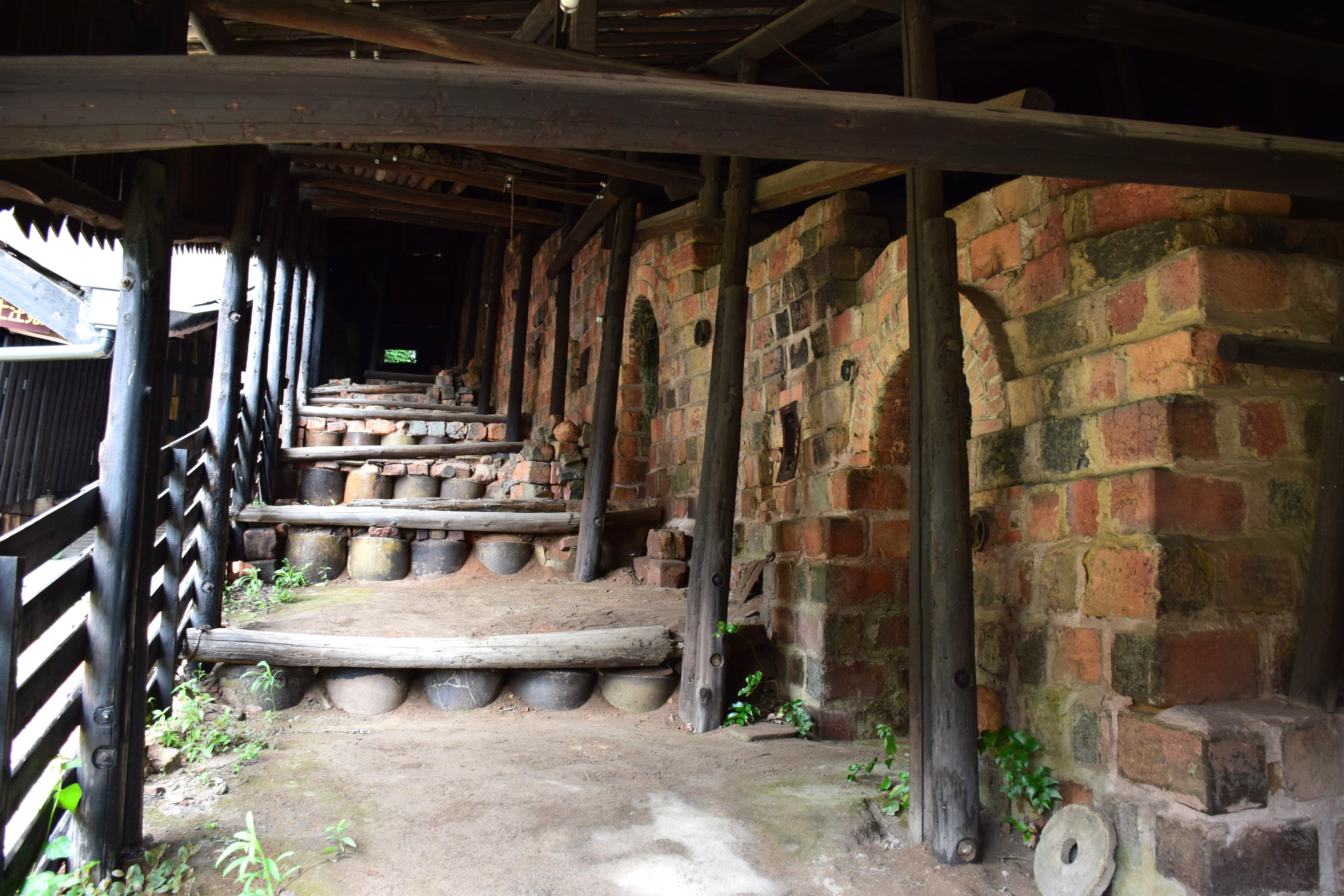 やきもの散歩道（登窯）